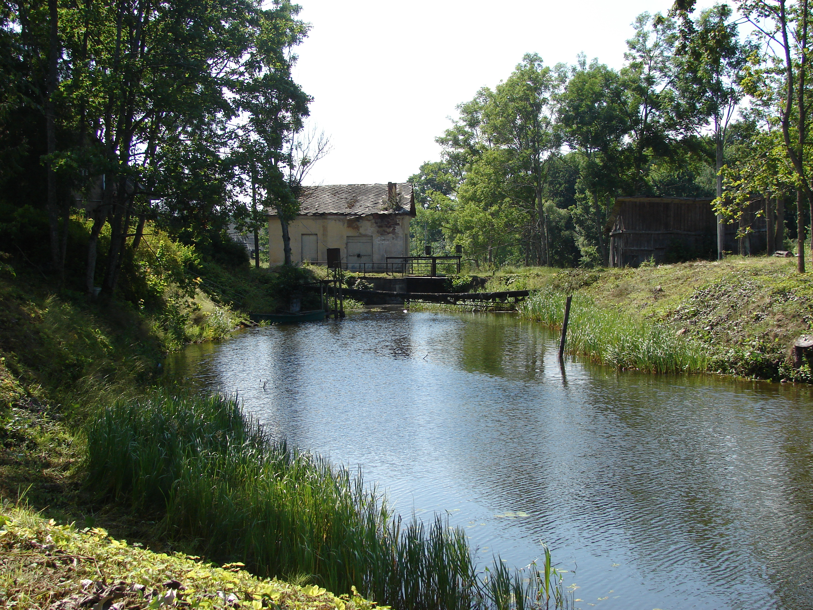 Tartaks un Kameņecas HES aizsprosts, Jaunaglona, Aglonas pagasts, Aglonas novads, Latvia